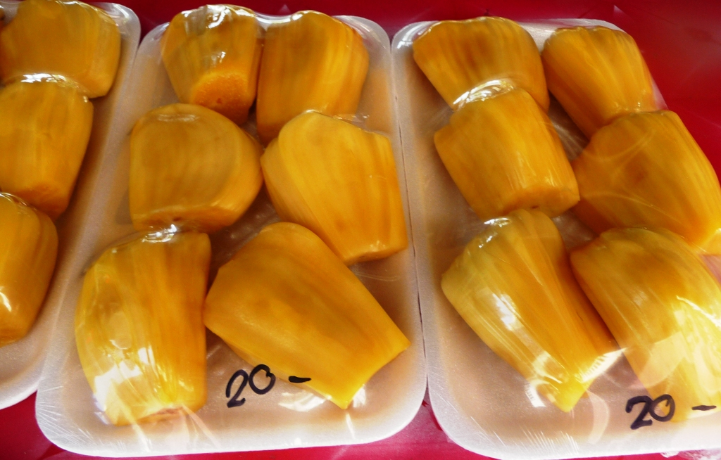 Artocarpus heterophyllus, Fruchtfleisch auf dem Markt